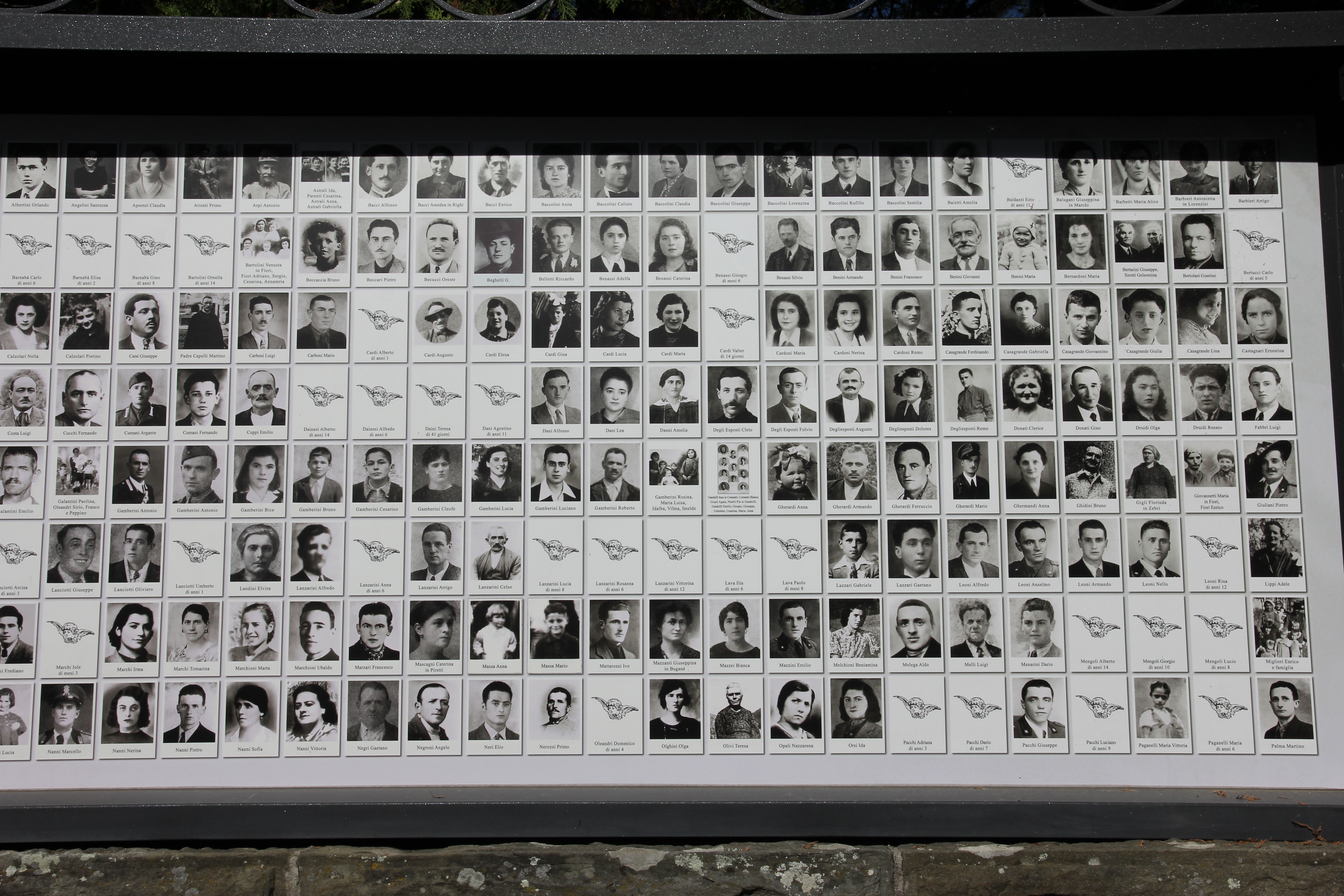 Sacrario dei caduti di Marzabotto This is a photo of a monument which is part of cultural heritage of Italy.